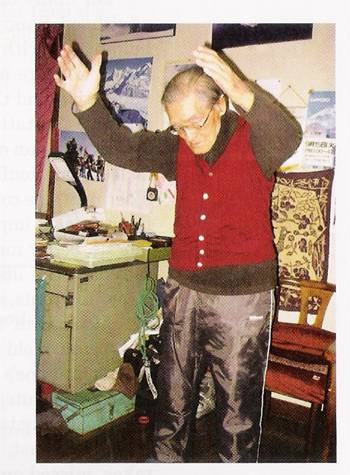 Keizo Miura(三浦敬三)